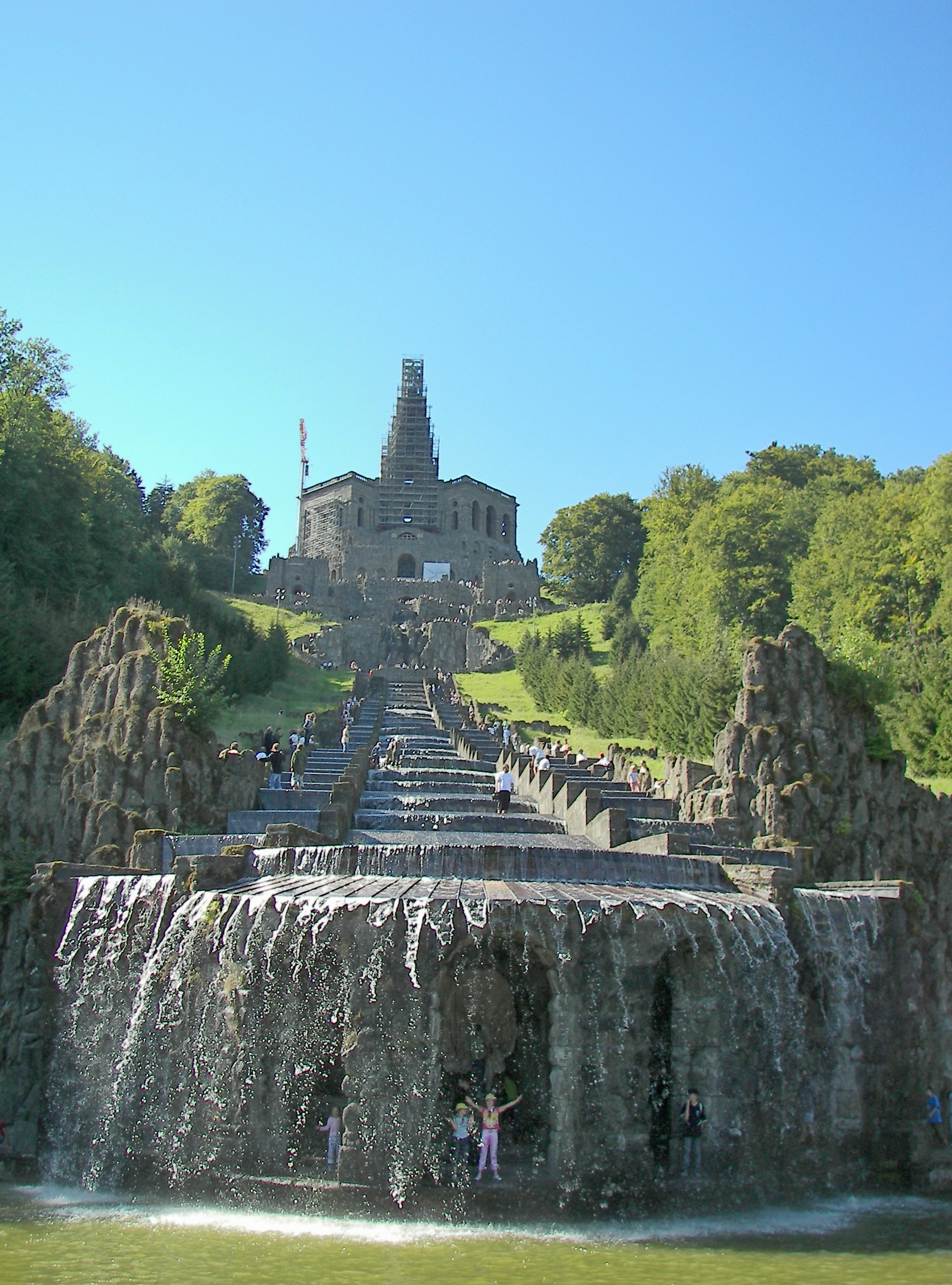 Kassel, Schlosspark Wilhelmshöhe, Wasserspiele an den Kaskaden